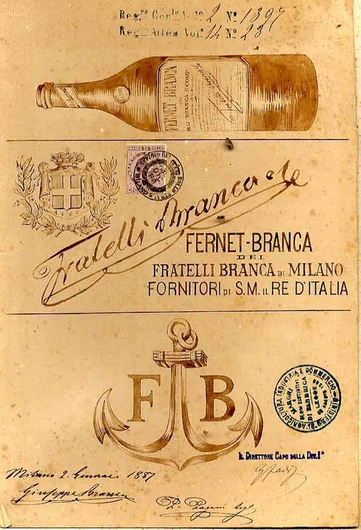 Marchio di fabbrica Fernet-Branca dei fratelli Branca di Milano fornitori di S.M. il re d'Italia (ACS, Ministero dell'Industria Commercio e Artigianato, Ufficio Italiano Brevetti e Marchi, Serie Marchi, fasc. 1397, 1887)